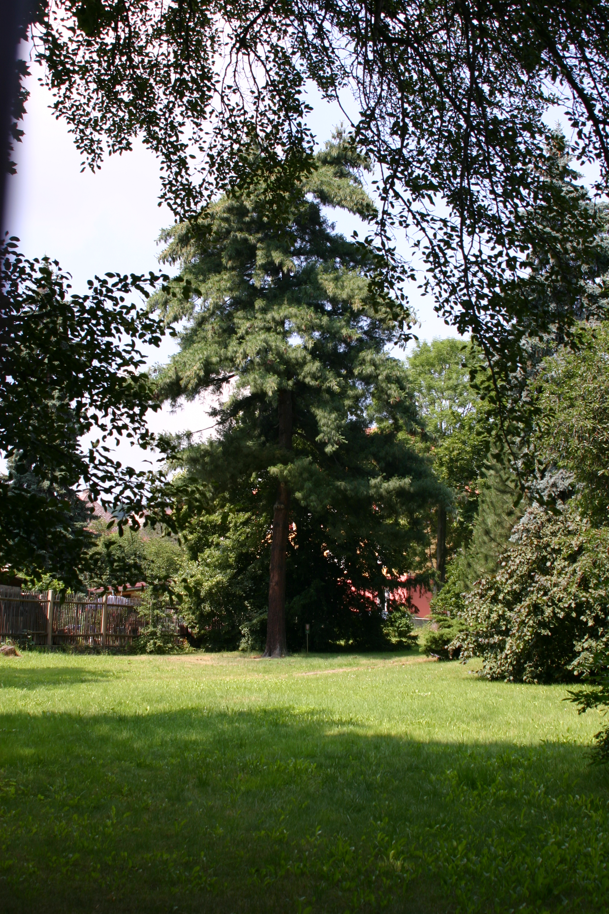 Chráněná borovice Schwerinova v Mostě